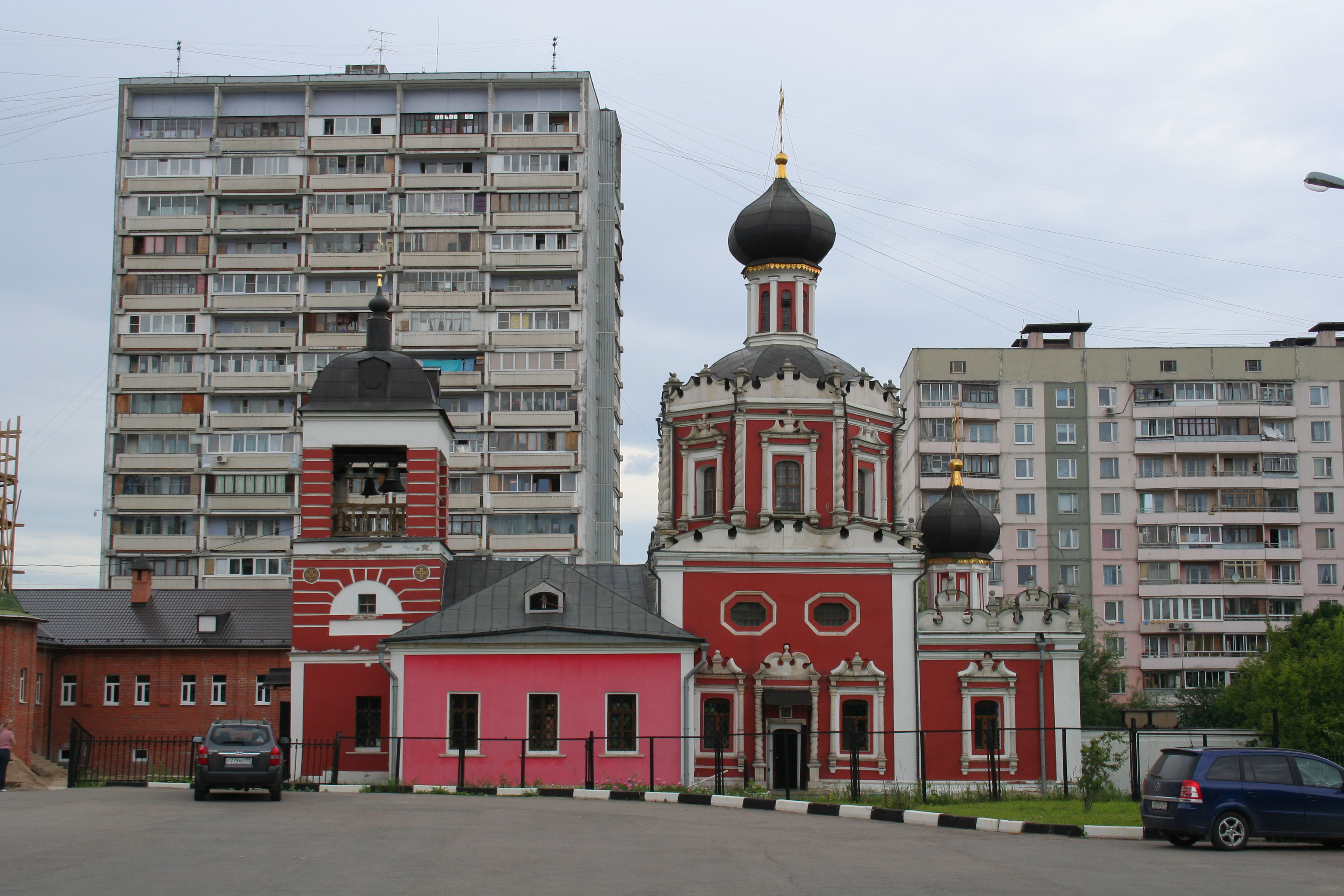 Kirche der Hl. Dreifaltigkeit zu Konkowo, Moskau.